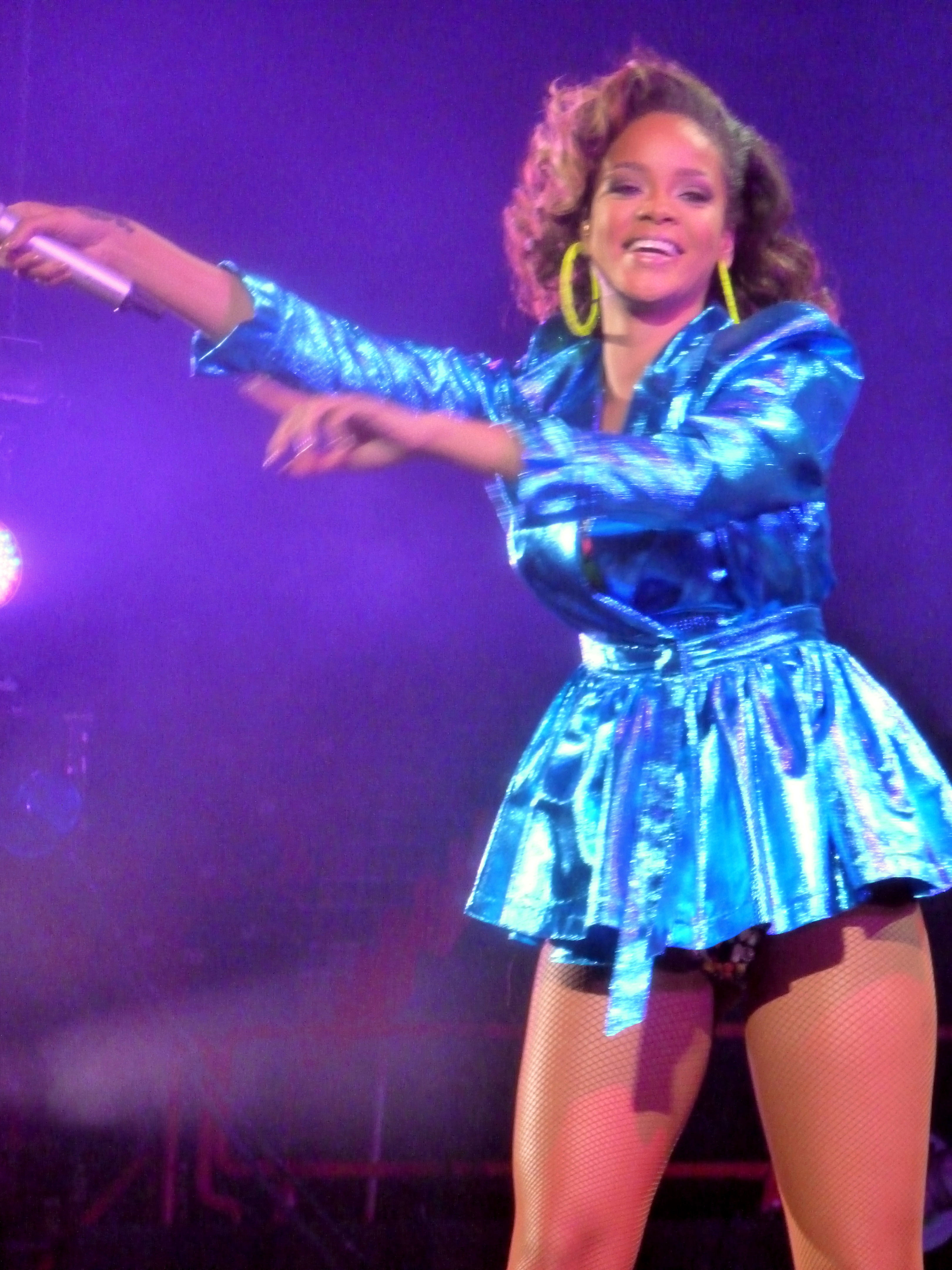 Rihanna en concert à Paris Bercy lors de sa tournée Loud Tour en Octobre 2011